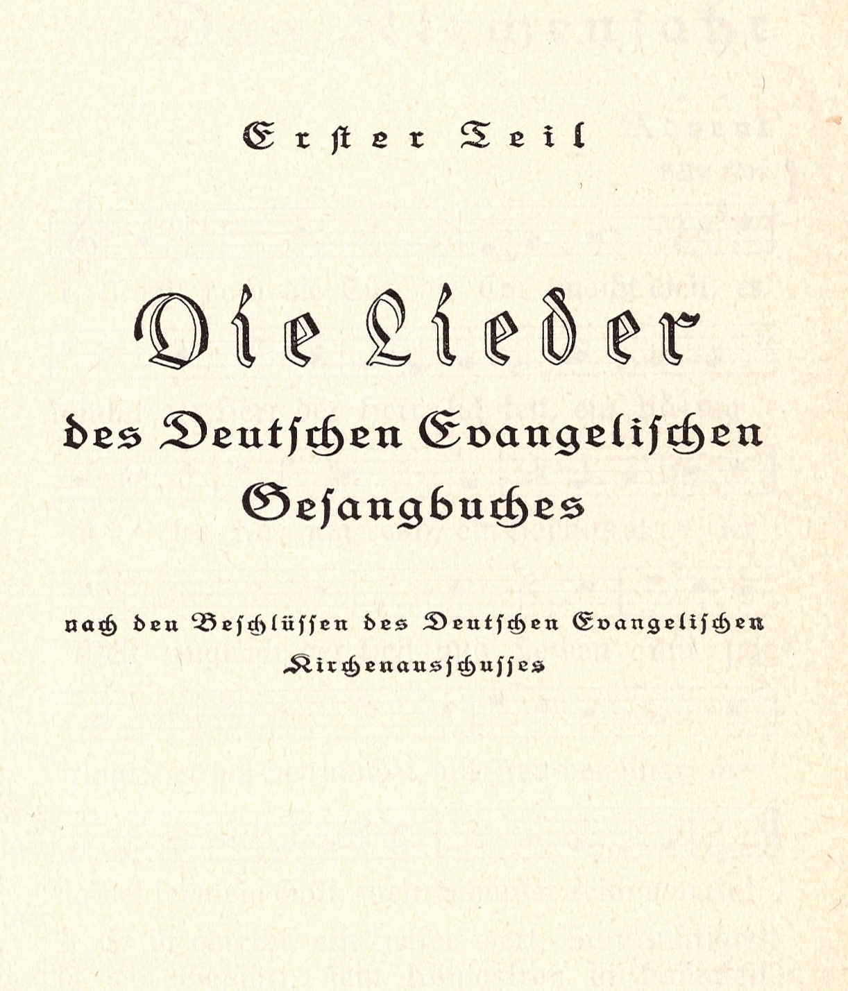 Evangelisches Gesangbuch für Rheinland und Westfalen, Titelseite des überregionalen Teils Die Lieder des Deutschen Evangelischen Gesangbuches nach den Beschlüssen des Deutschen Evangelischen Kirchenausschusses, Nr. 1-342